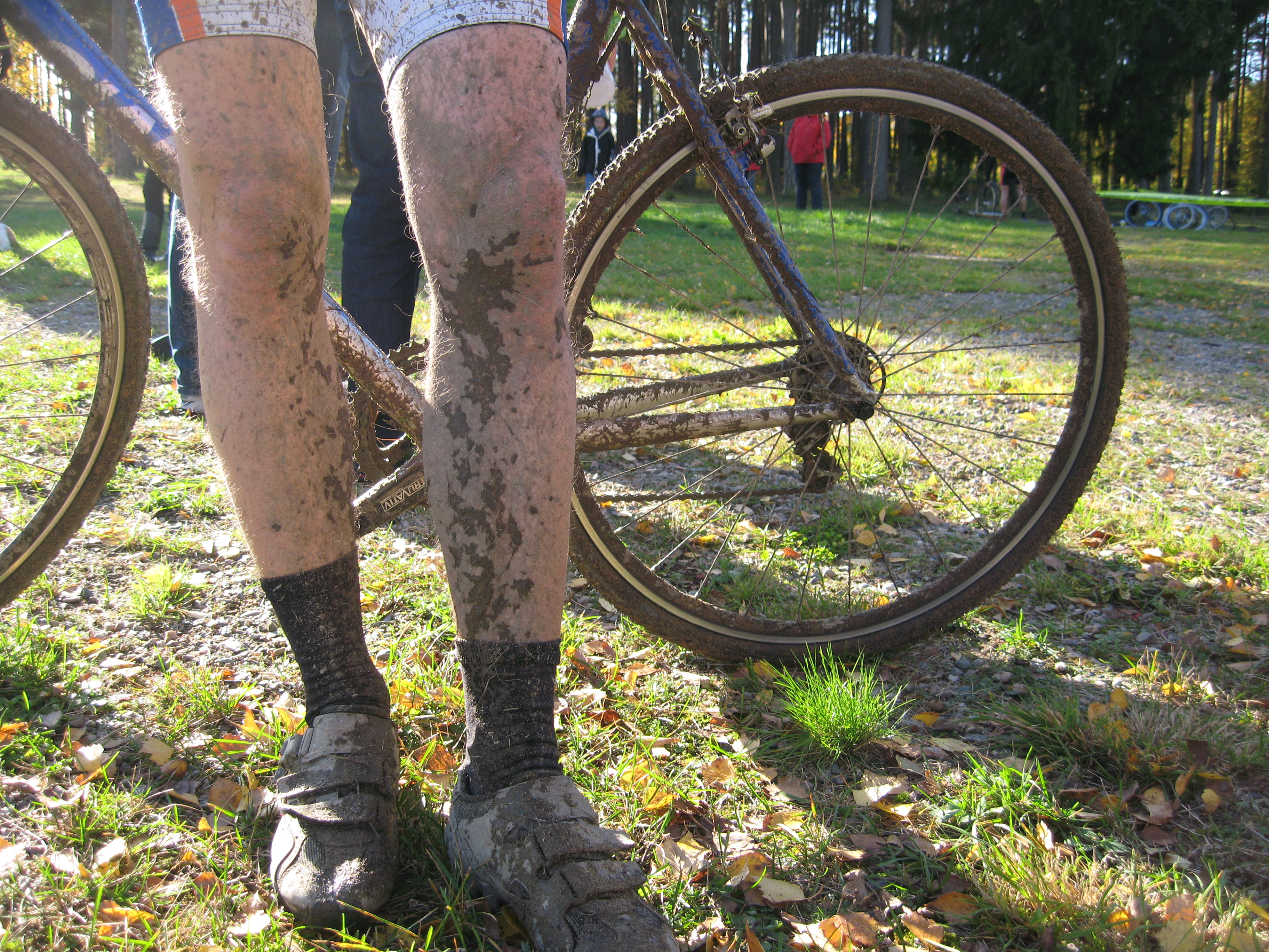 I cykelcross blir man skitig